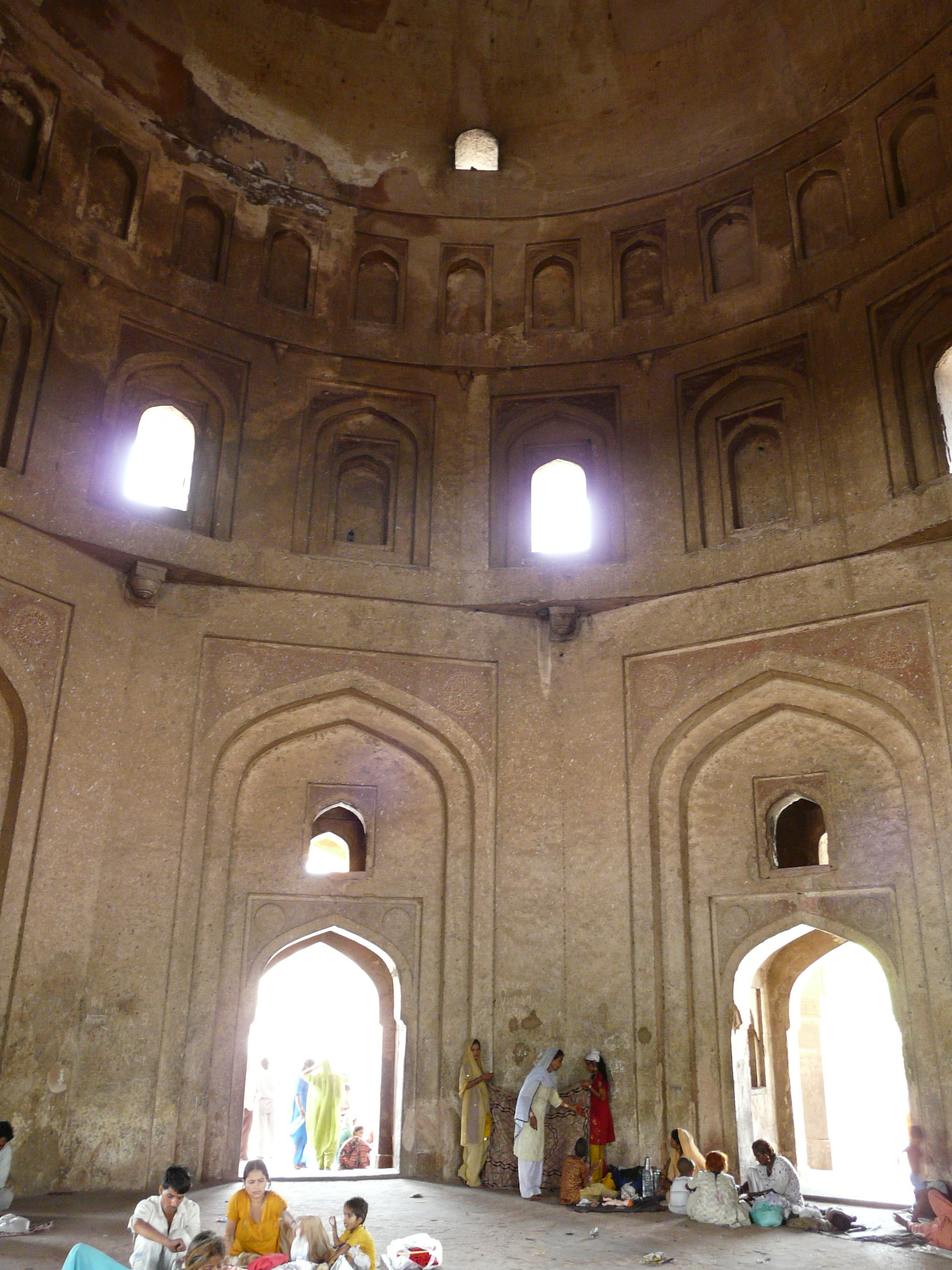 Adham Khan tomb interior, Mehrauli, Delhi.